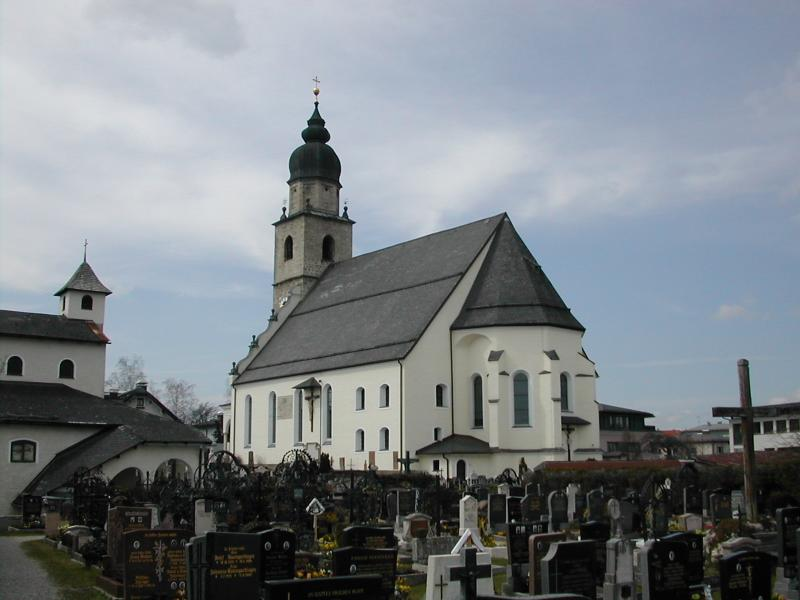 Seekirchen am Wallersee, Pfarrkirche